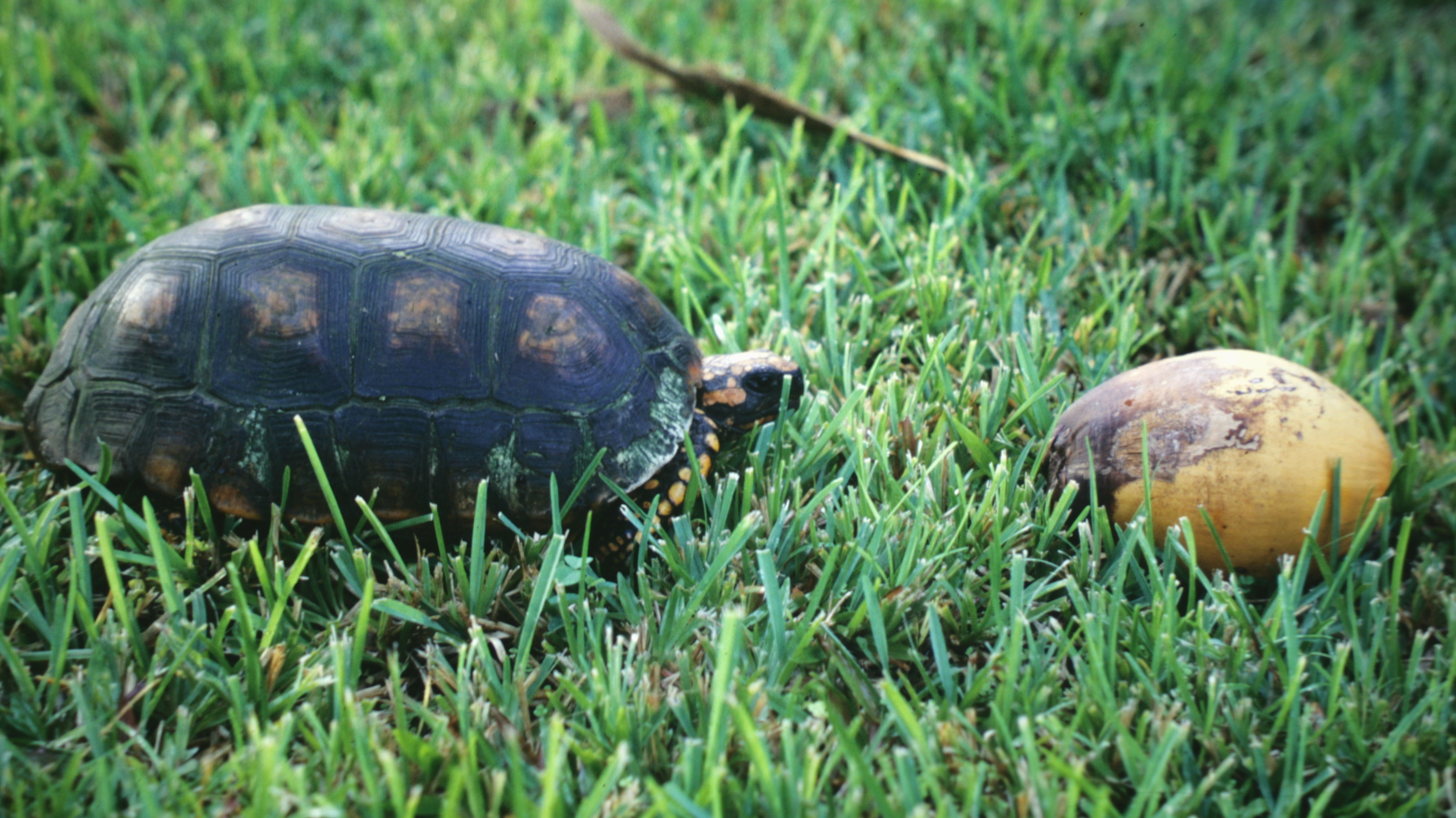 Geochelone denticulata, Suriname.